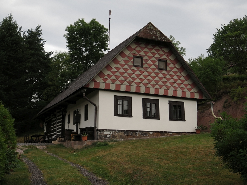 Venkovská usedlost, Krsmol 19, Krsmol.